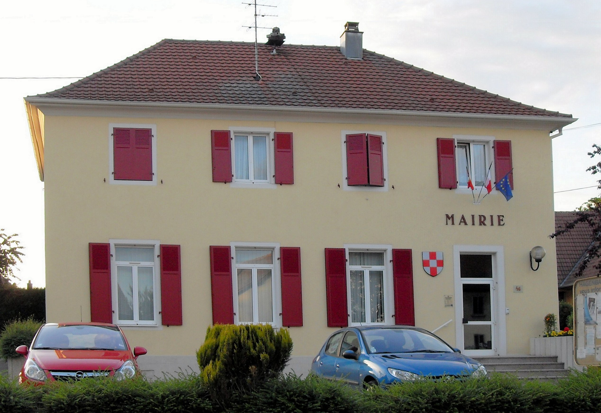 La mairie d'Hagenbach